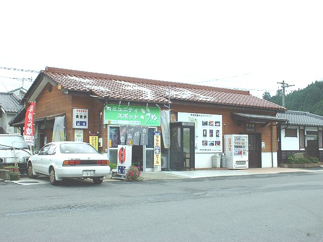 甲奴駅